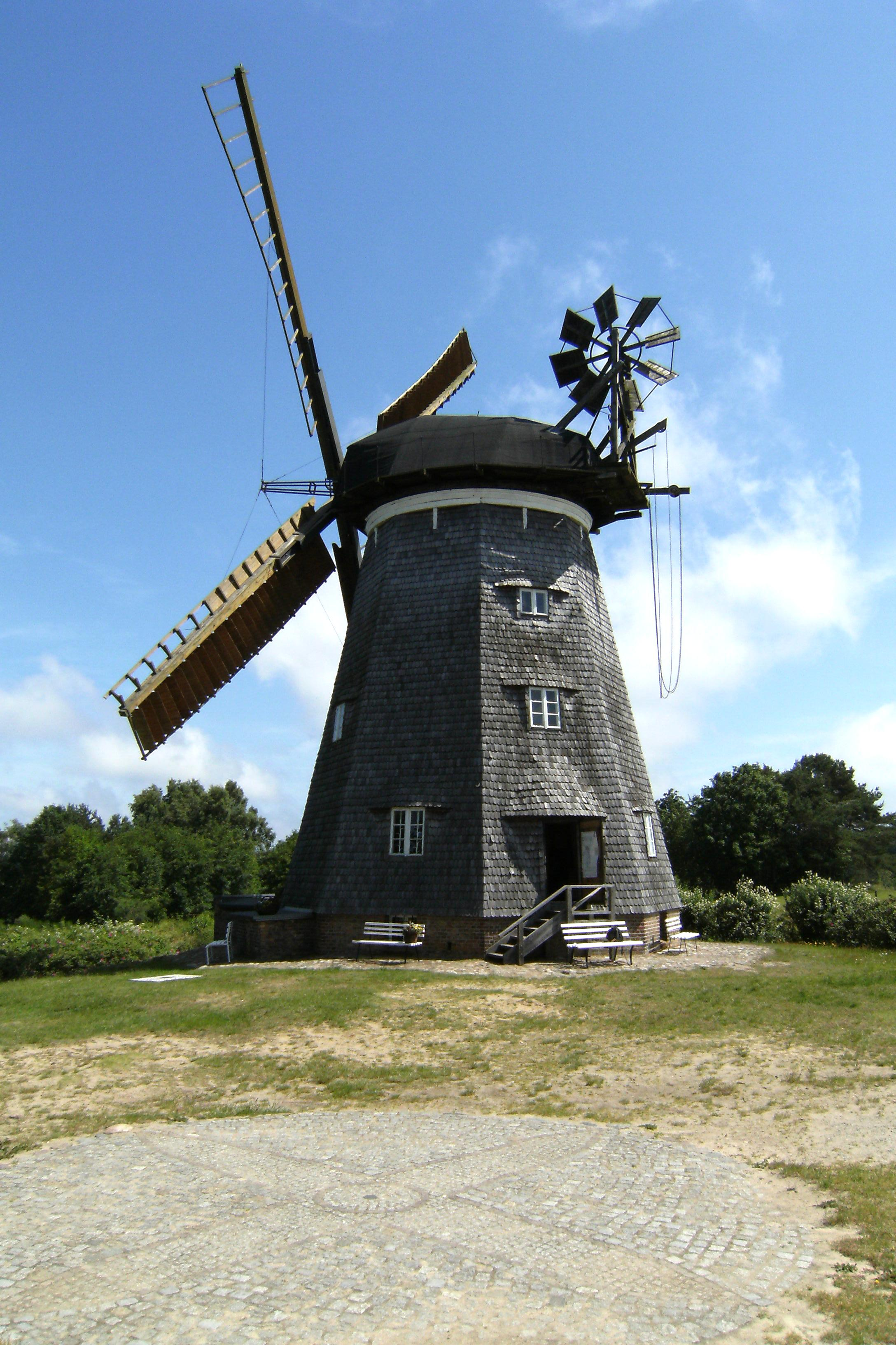 Erdholländer Benz